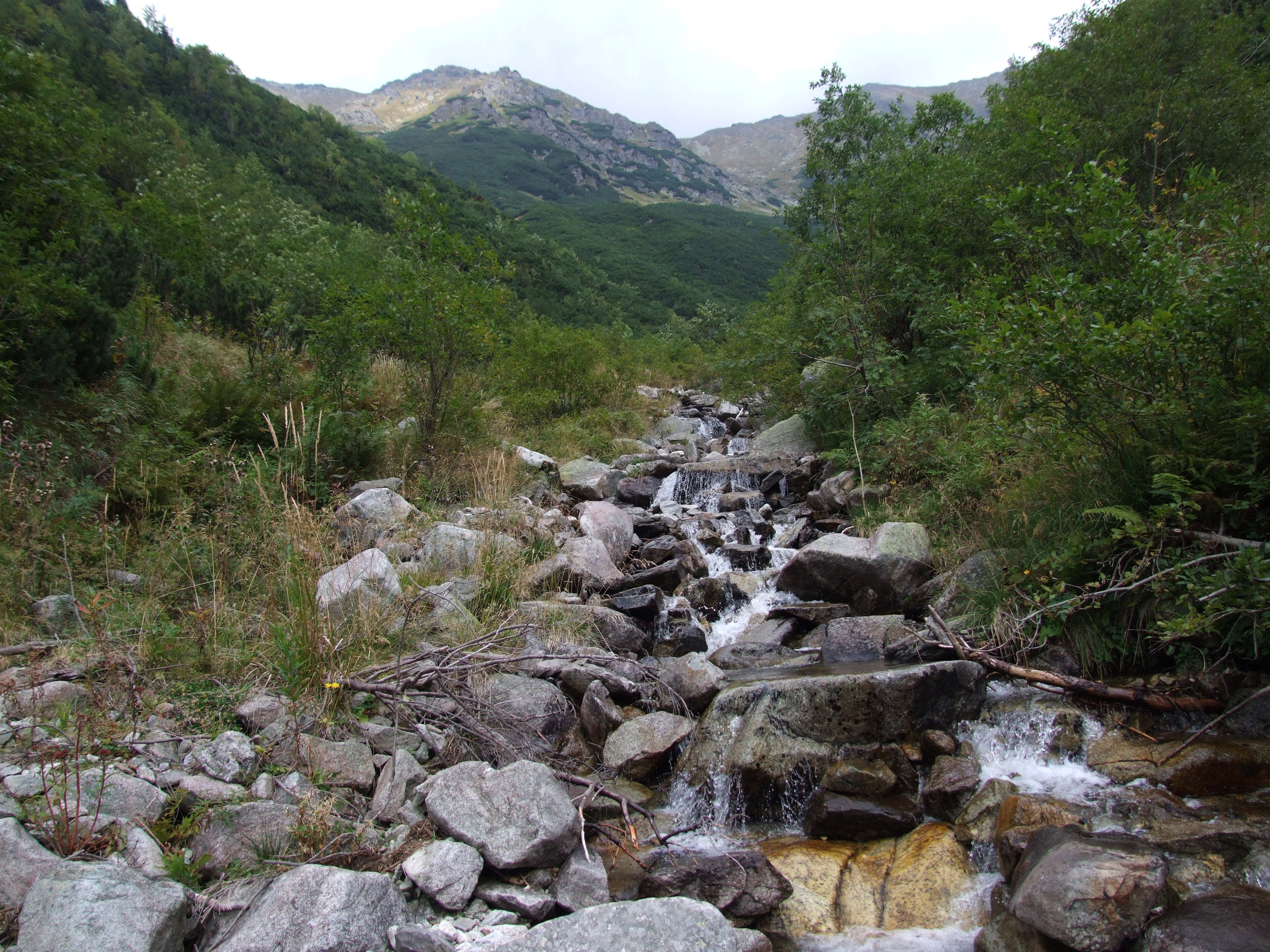 Dolina Parzychwost w środkowej części